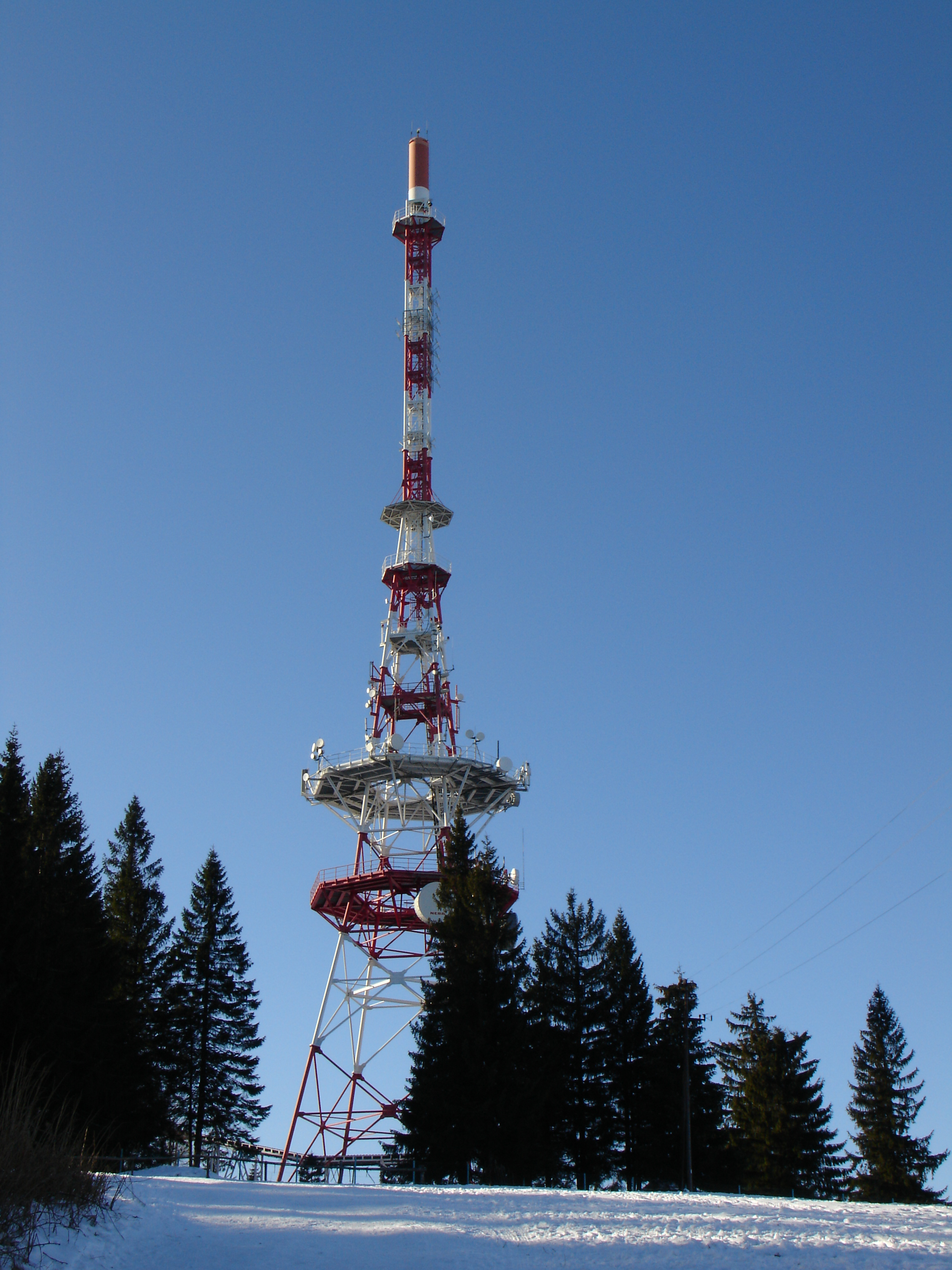 Zakopane-Gubałówka transmitter